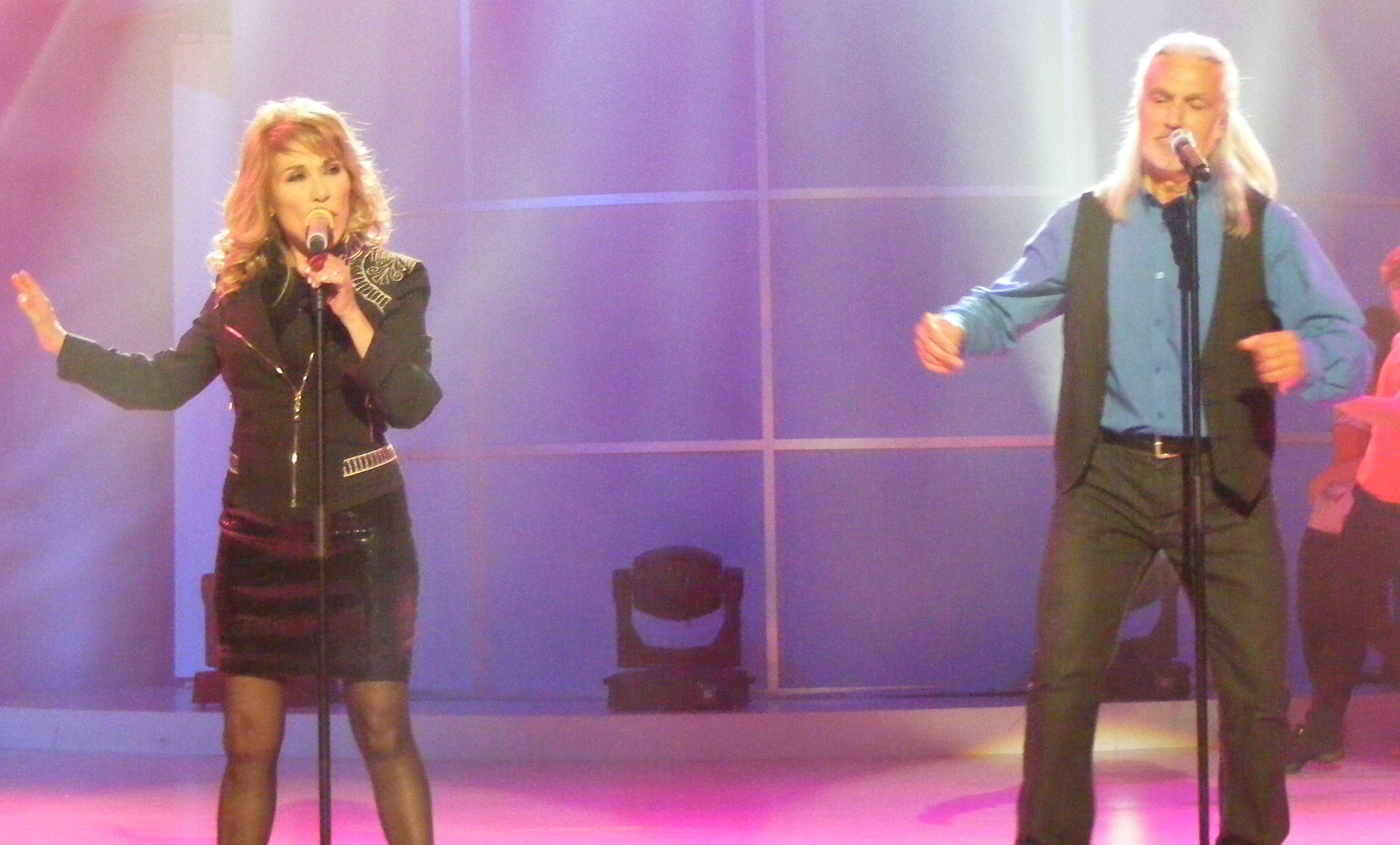 Helena Bianco y Guillermo Antón cantantes españoles en el 906º programa de Luar